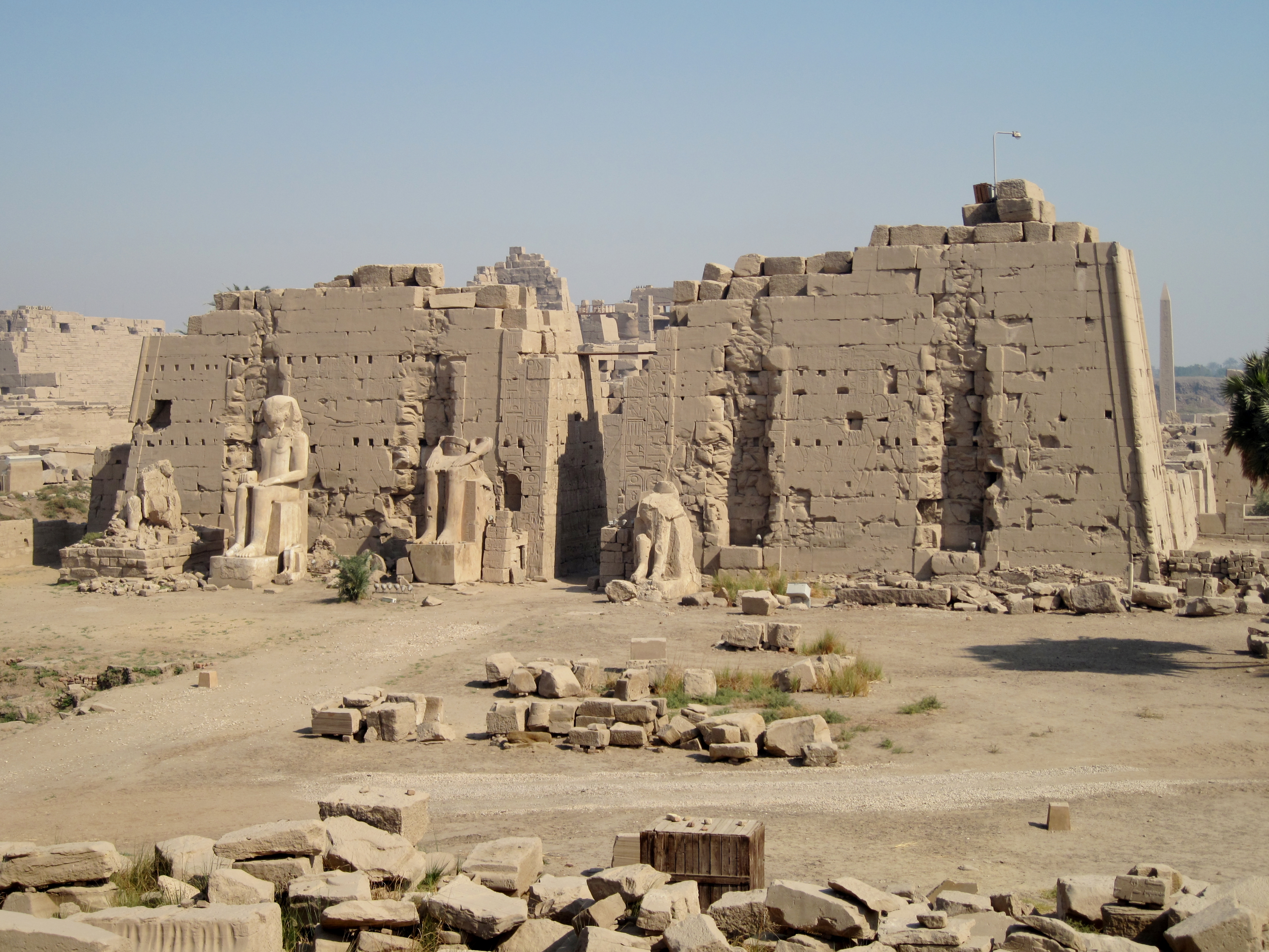 Achter Pylon des Tempels von Karnak, nördlich von Luxor, Ägypten